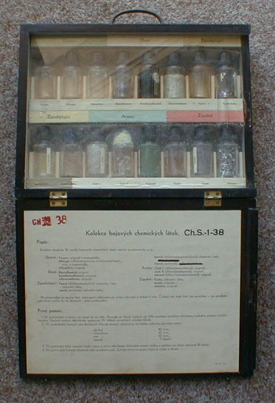 Vzorkovnice BCHL I/1938 Chema vnitřek